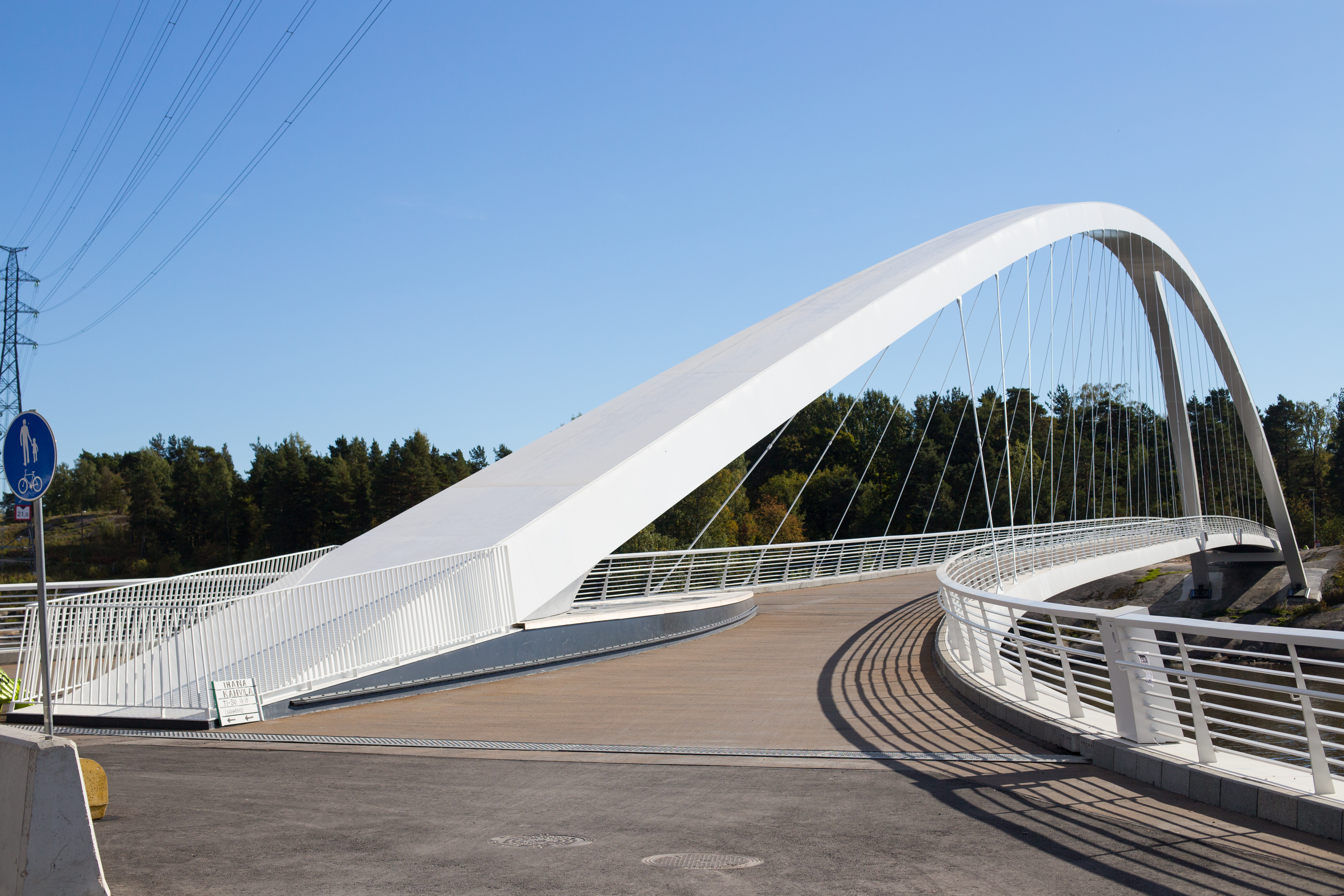 Isoisän silta